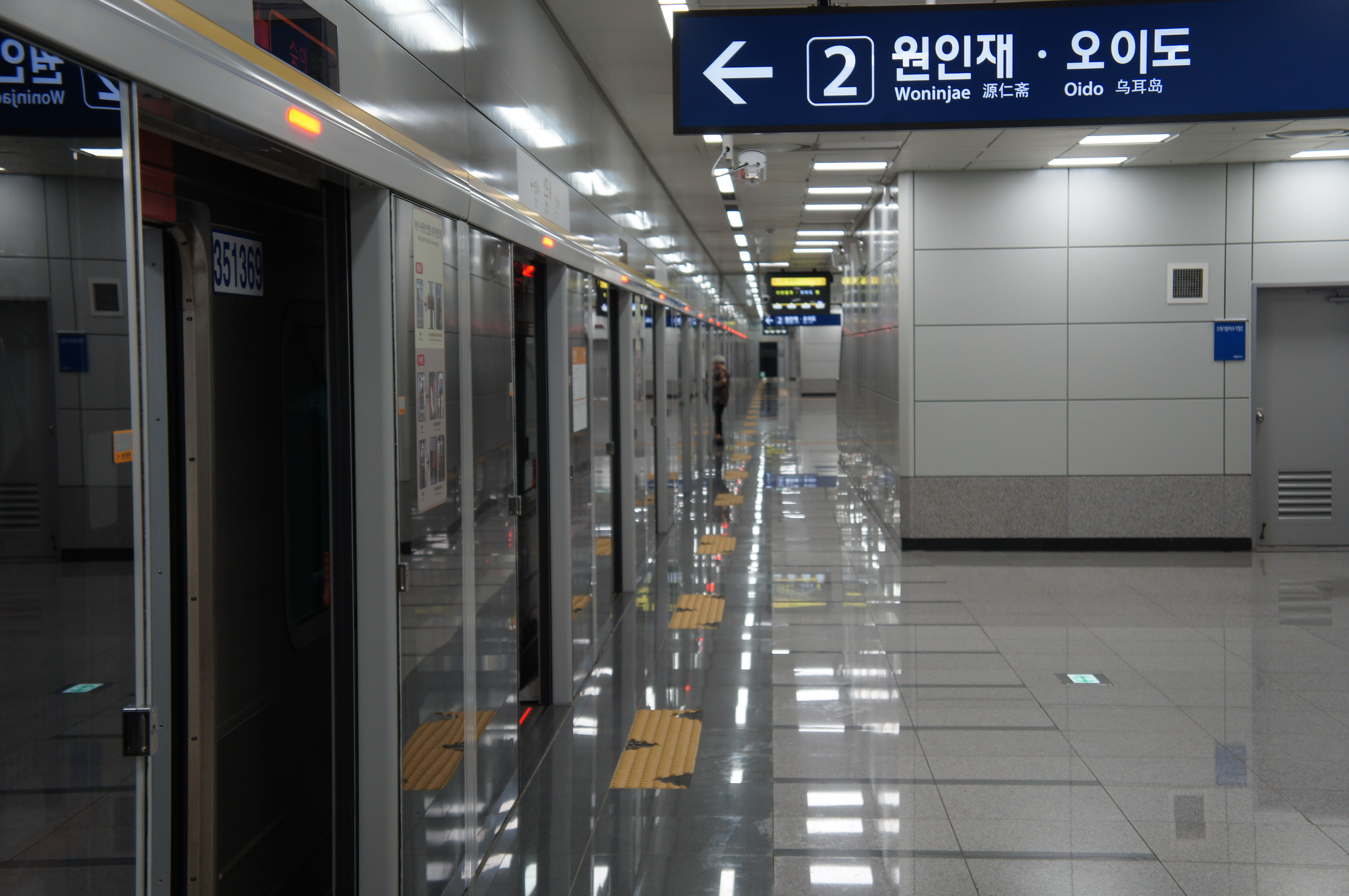 신포역 승강장